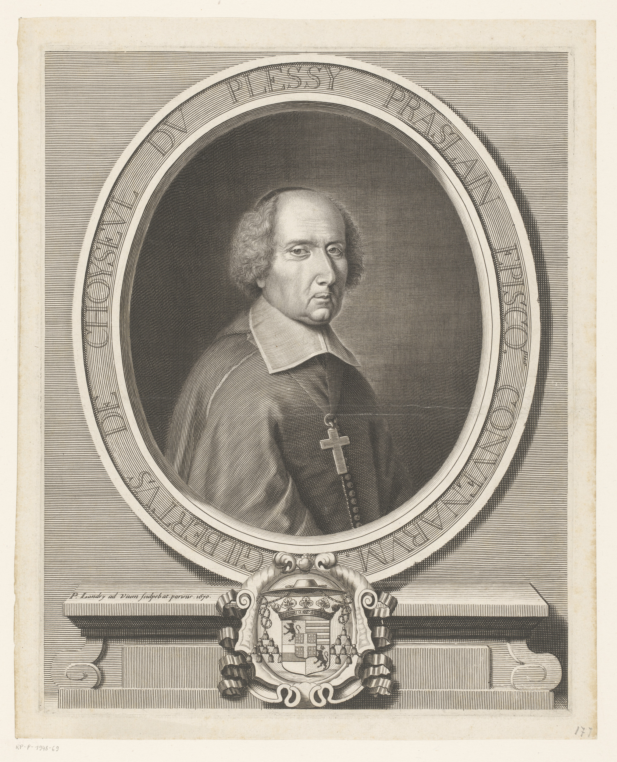 IdentificatieTitel(s): Portret van Gilbert de Choiseul Duplessis PraslinObjecttype: prent Objectnummer: RP-P-1948-69Catalogusreferentie: IFF 17e siècle 92Opschriften / Merken: verzamelaarsmerk, verso, gestempeld: Lugt 2228VervaardigingVervaardiger: prentmaker: Pierre Landry (vermeld op object)Plaats vervaardiging: ParijsDatering: 1670Materiaal: papier Techniek: graveren (drukprocedé)Afmetingen: plaatrand: h 350 mm × b 279 mmOnderwerpWat: historical personsarchbishop, bishop, etc. (Roman Catholic)ornament ~ medallionarmorial bearing, heraldryWie: Gilbert de Choiseul Duplessis PraslinVerwerving en rechtenVerwerving: aankoop 1948Copyright: Publiek domein